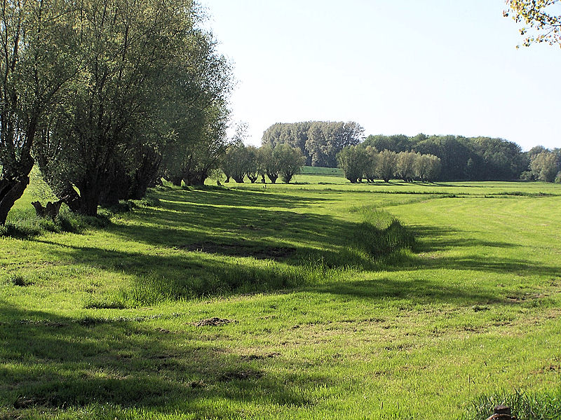 Wiesenlandschaft bei Gramkow